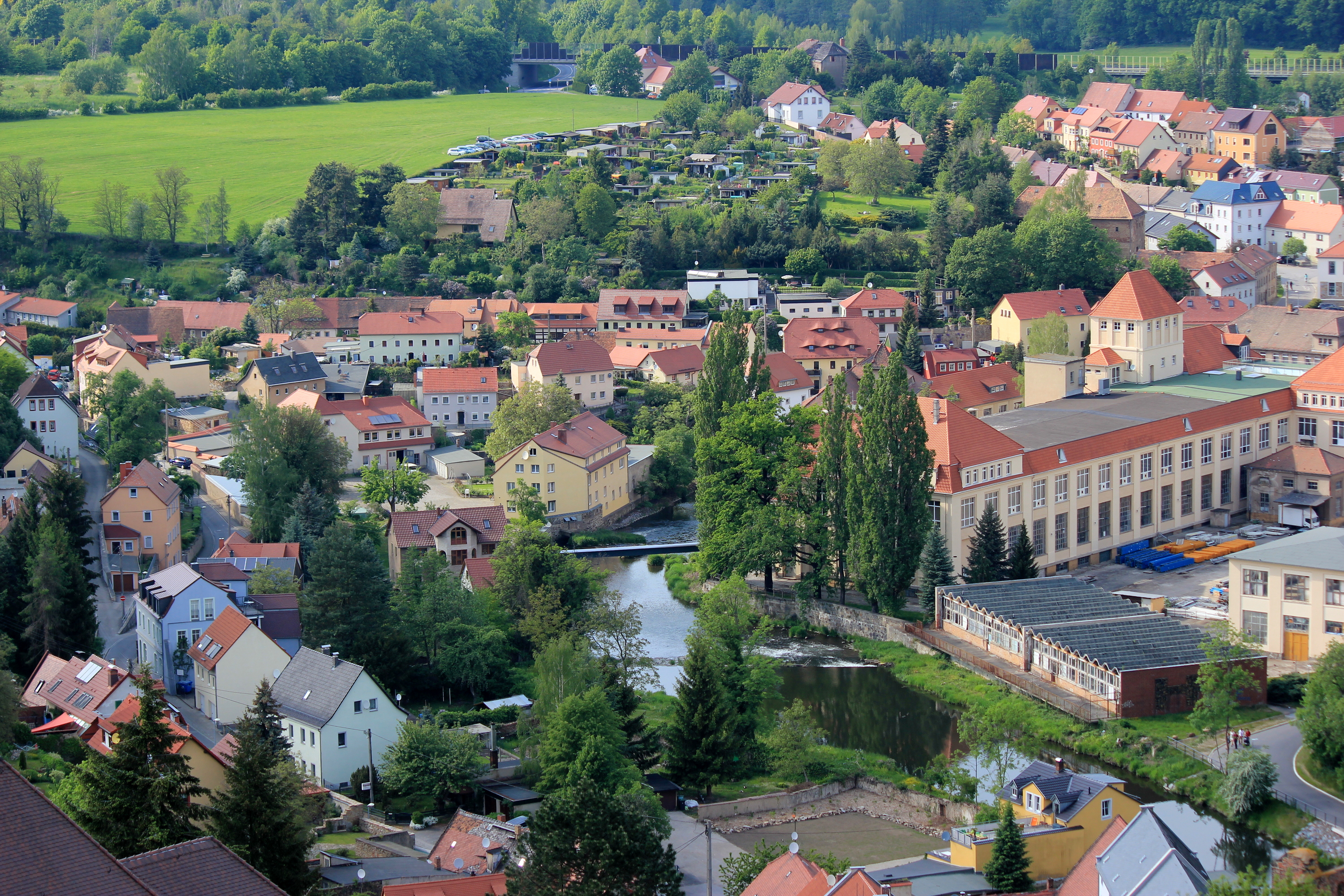 Hornjoserbsce: Napohlad Židowa z wěže Tachantskeje cyrkwje.